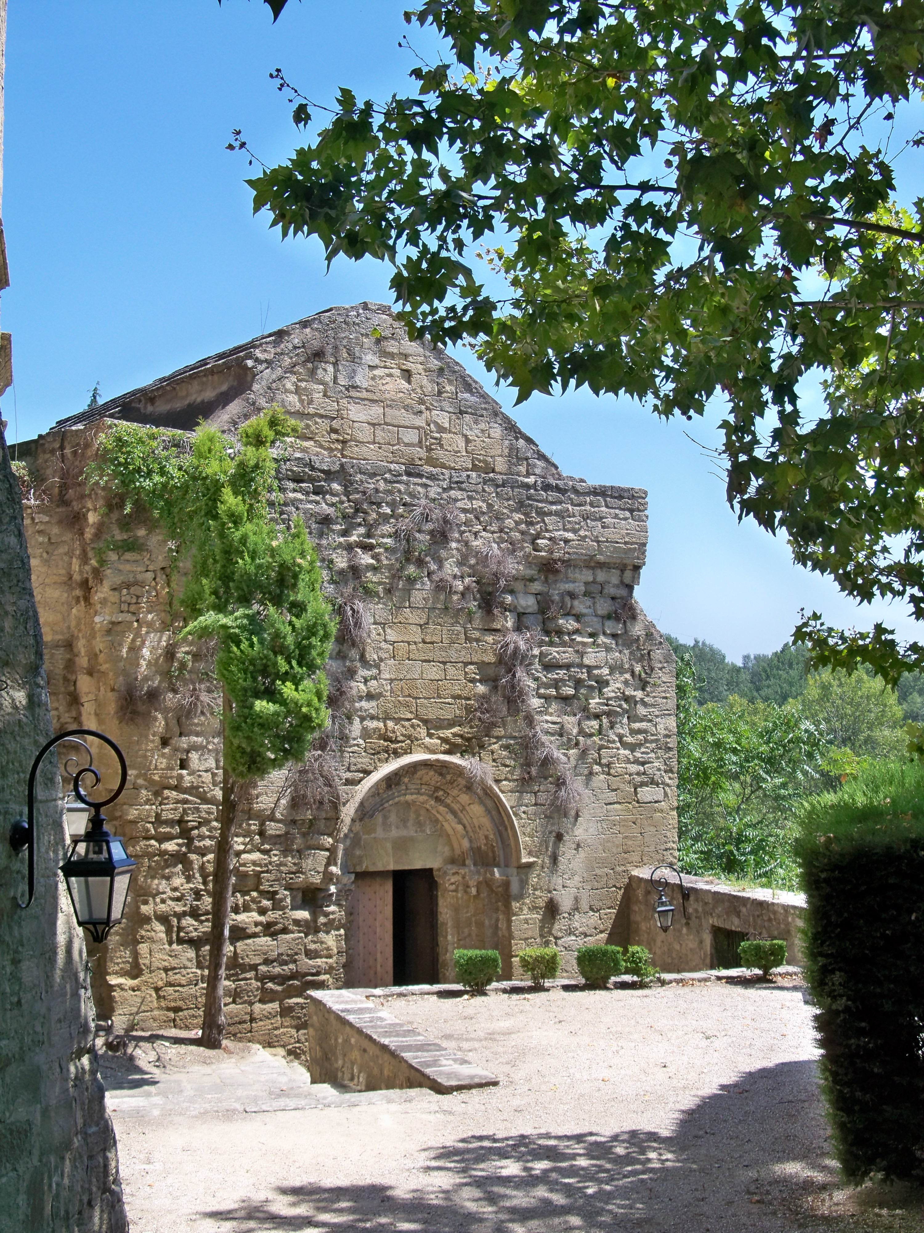 Chapelle de la chartreuse de Bonpas (Vaucluse)